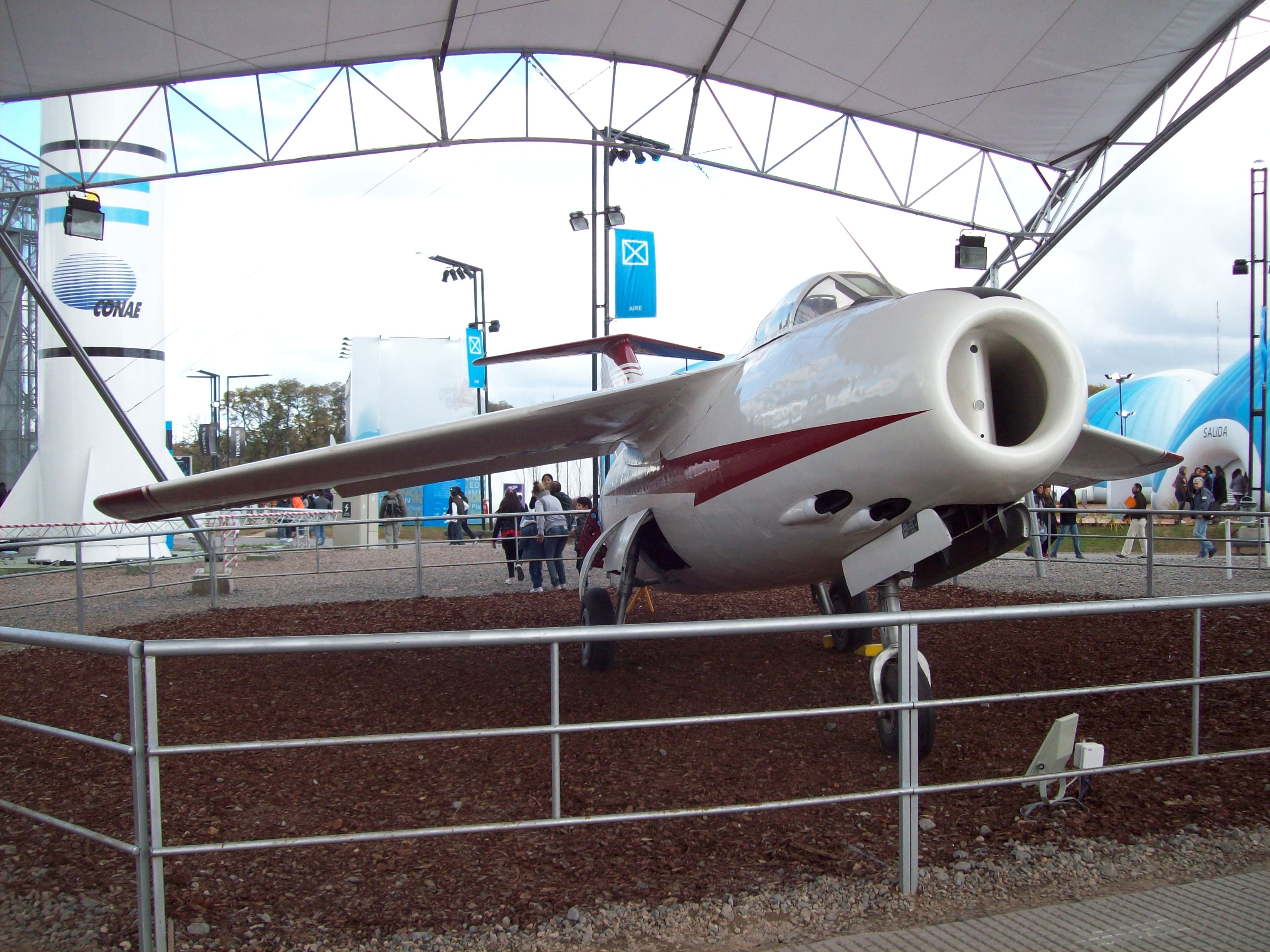 Avión argentino Pulqui II manufacturado en la fábrica militar de aviones en Córdoba.